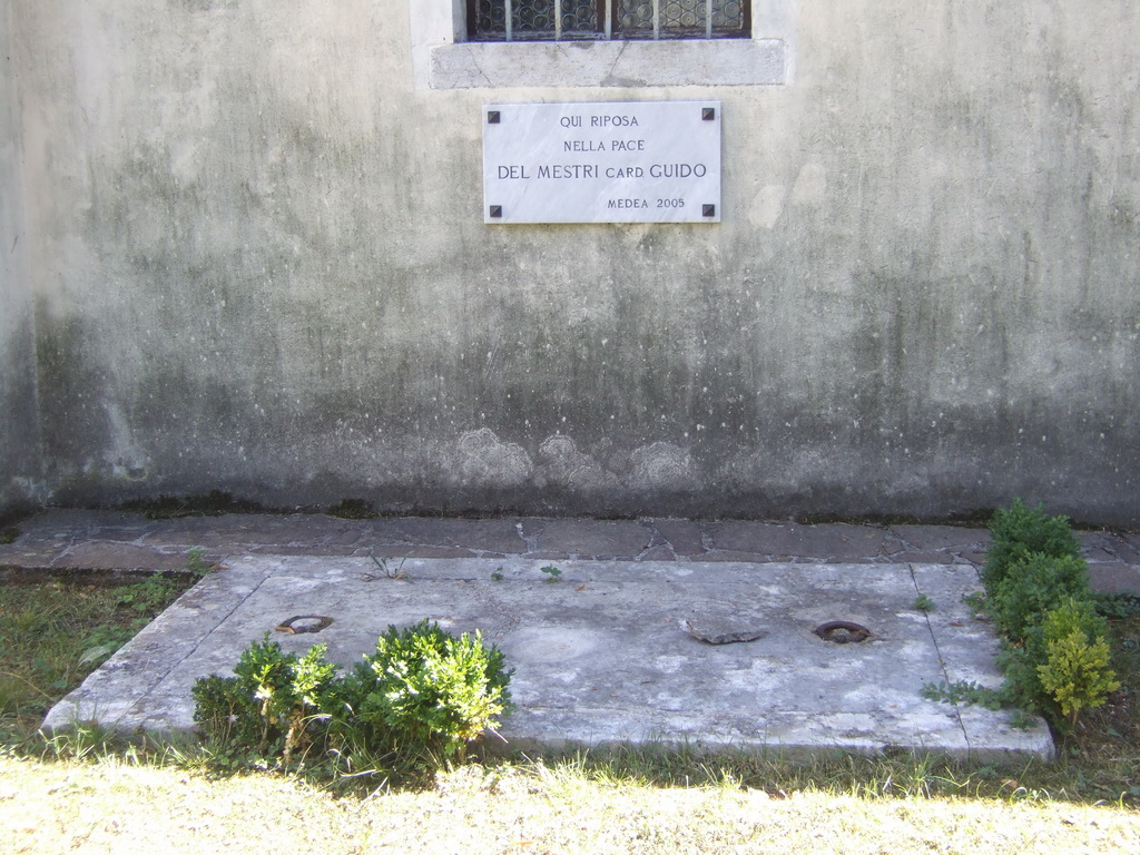 Medea - Colle Ara Pacis - Chiesetta di sant'Antonio Tomba del cardinale Del Mestri